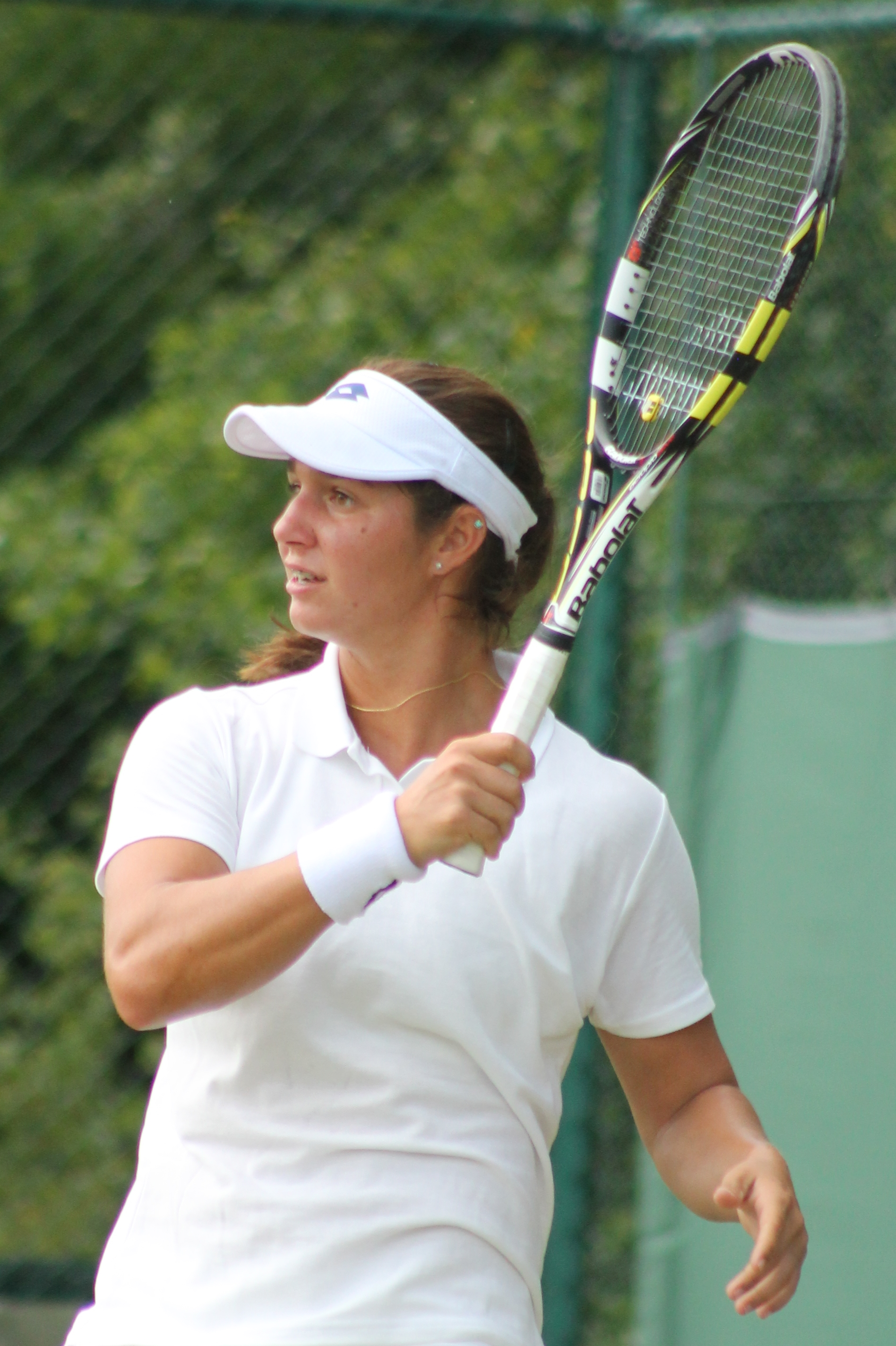 Stewart WMQ15 (6)